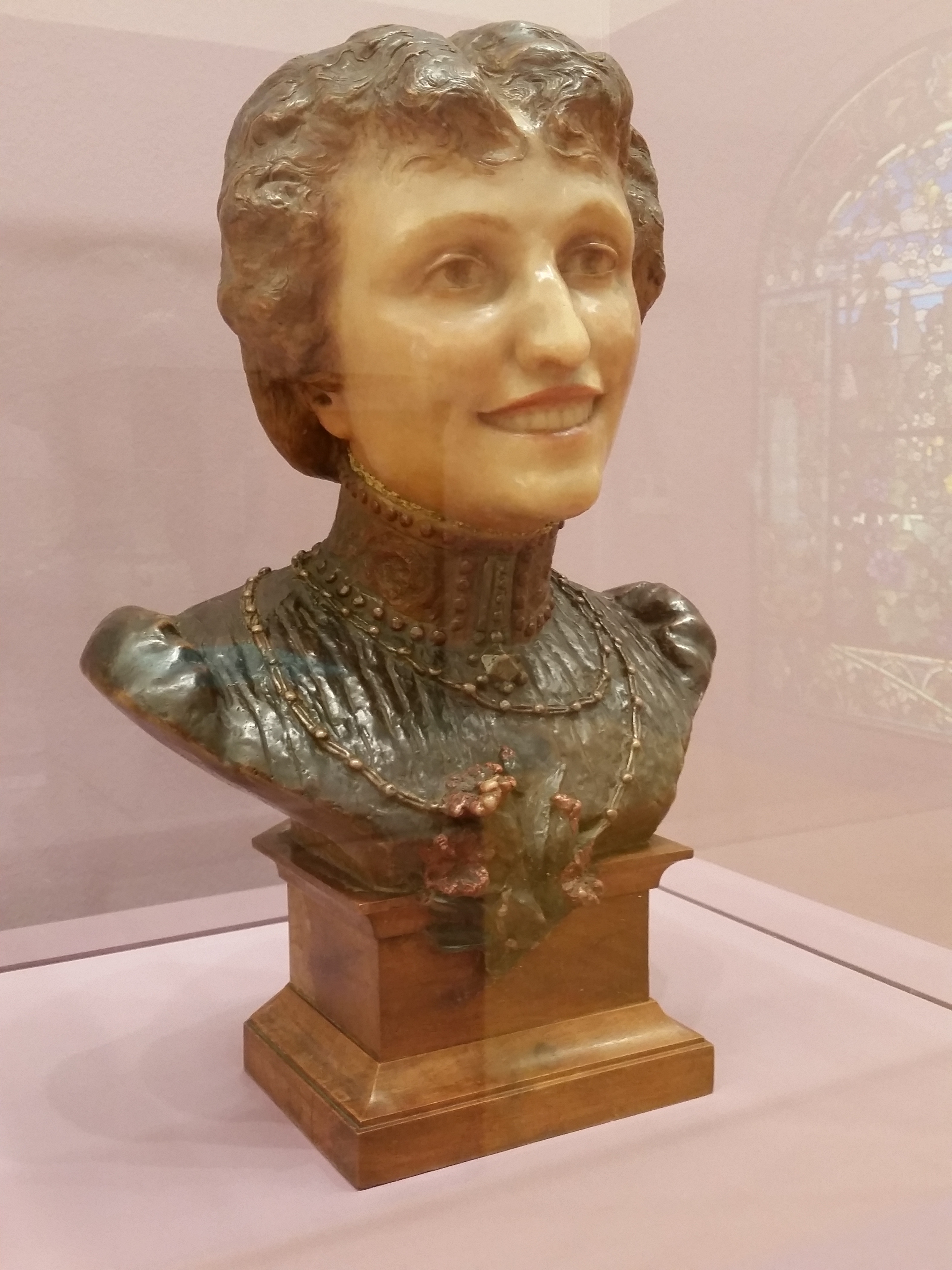 Portrait de Sarah Bernhardt (1895), par Jean-Désiré RINGEL D'ILLZACH (1847-1916). Cire polychrome avec socle en bois. Strasbourg Museum of Modern and Contemporary Art Native nameMusée d'art moderne et contemporain de Strasbourg (MAMCS)Parent institutionMusées de la Ville de Strasbourg LocationStrasbourgCoordinates48° 34′ 46″ N, 7° 44′ 10″ E Established1998Web page control : Q845468 VIAF: 145326281 ISNI: 0000 0001 2324 9632 ULAN: 500283621 LCCN: n92119118 SUDOC: 026393344 WorldCat institution QS:P195,Q845468